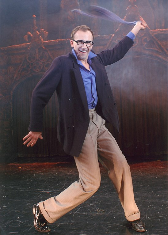 Jakub Lasota w spektaklu The Rocky Horror Show, Teatr Rozrywki w Chorzowie (Brad Majors)